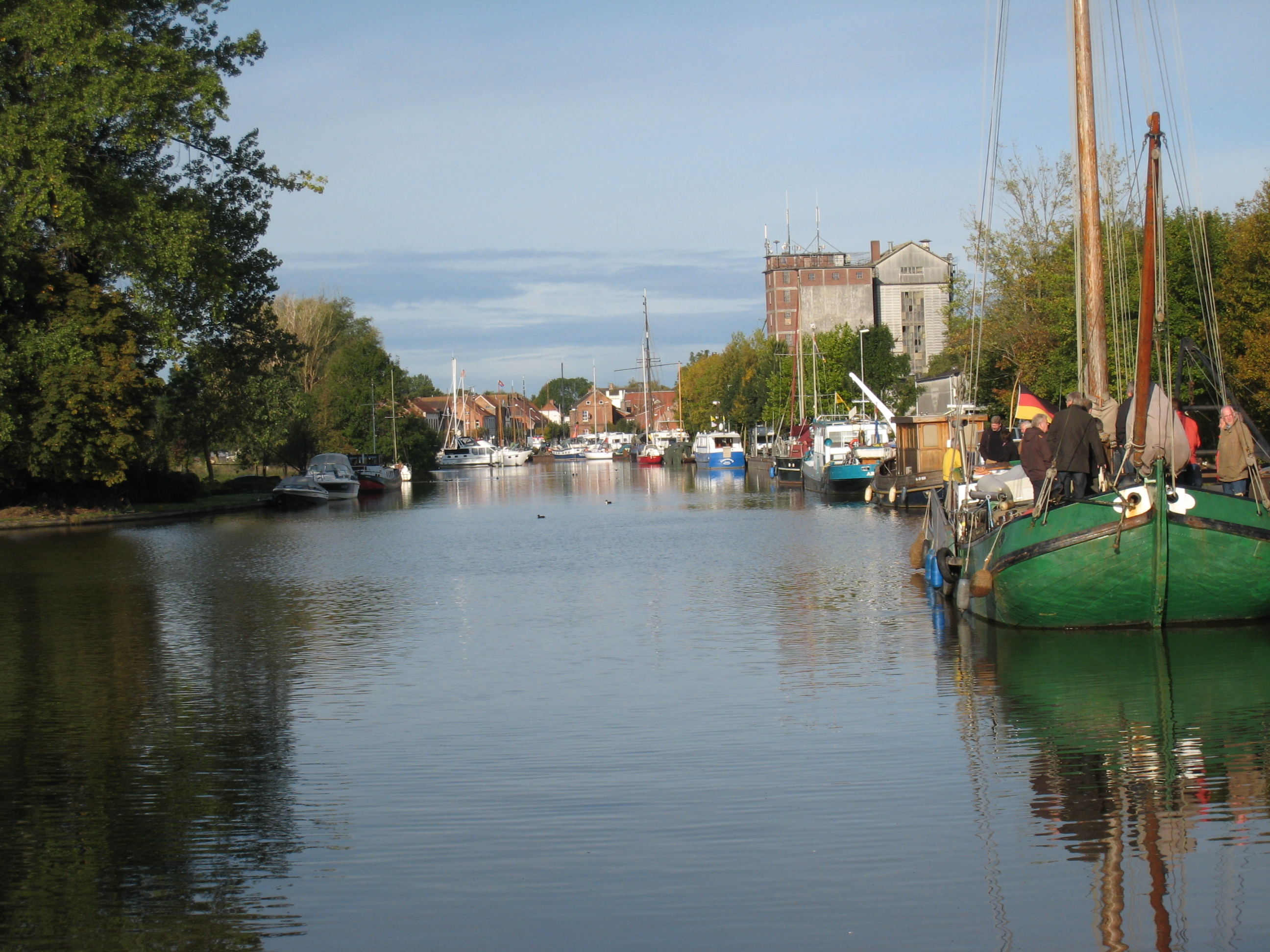 Der alte Hafen Weener